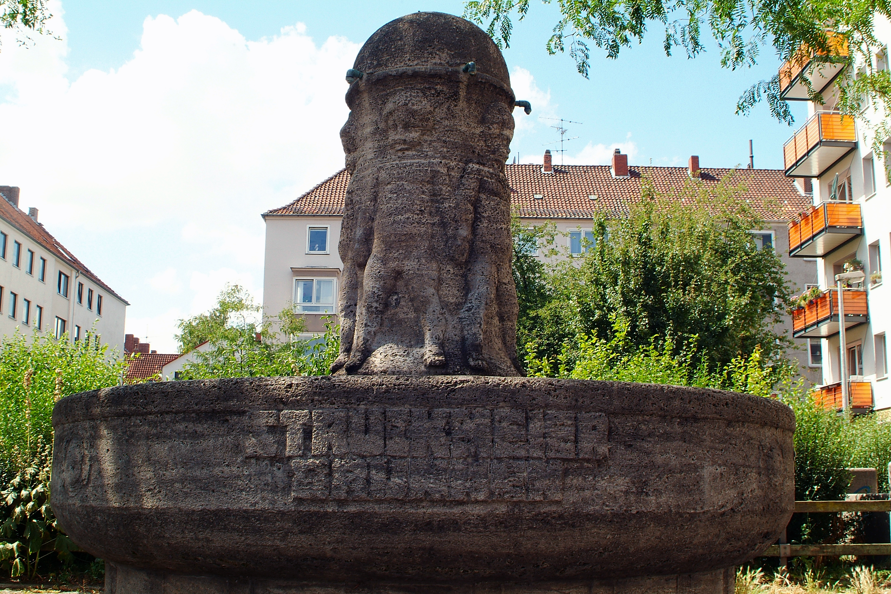 Die Schale und die Figuren des Struckmeyer-Brunnens in der Südstadt von Hannover bildete der hannoversche Bildhauer Roland Engelhard aus Muschelkalk ...